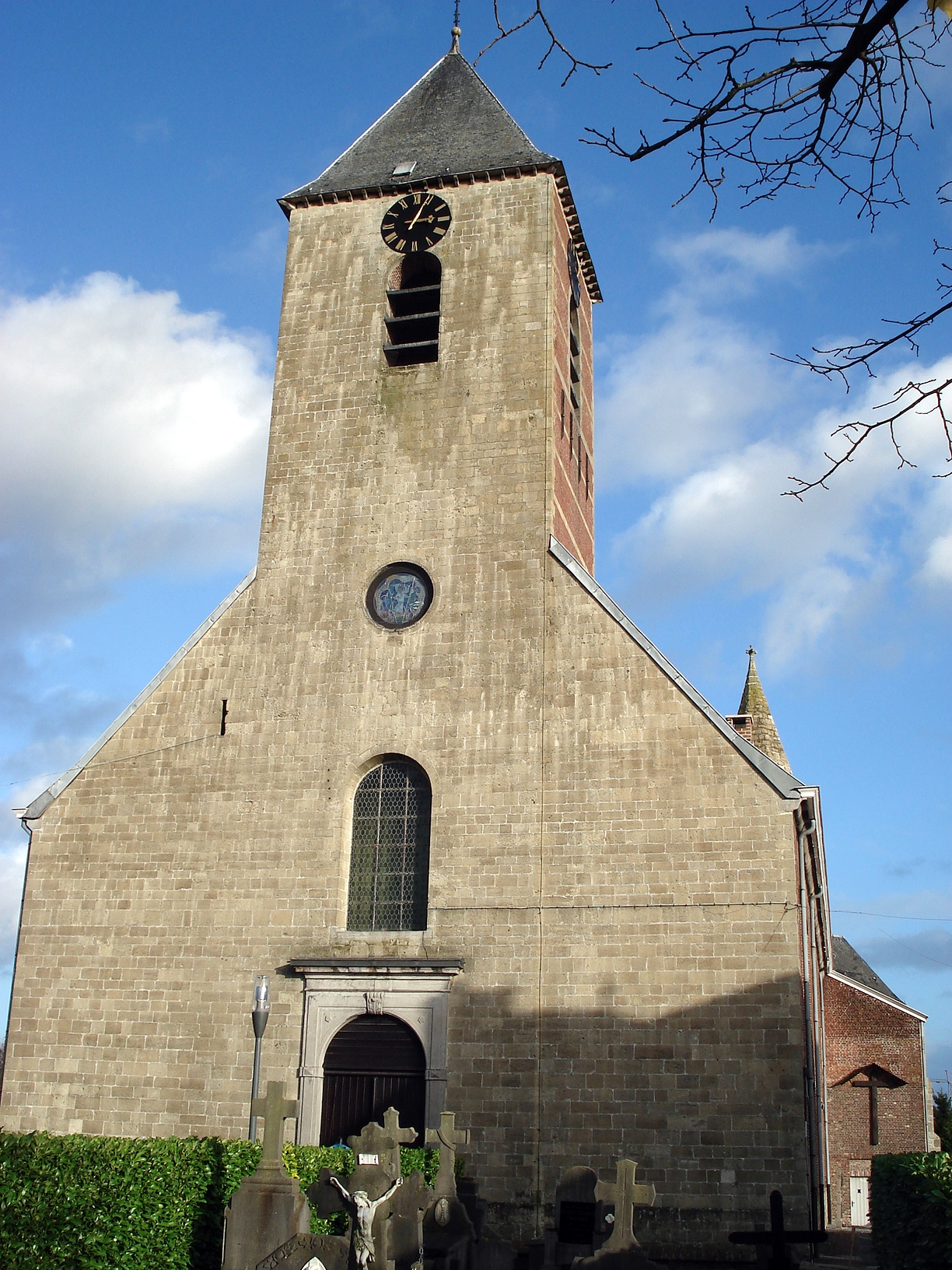 Sint-Michielskerk te Sint-Lievens-Houtem, Oost-Vlaanderen. Klassieke westgevel met klokketoren (1776).